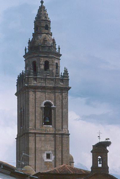 Iglesia de los Santos Juanes - Nava del Rey (Valladolid) - Diapositiva 48 x 48 Color